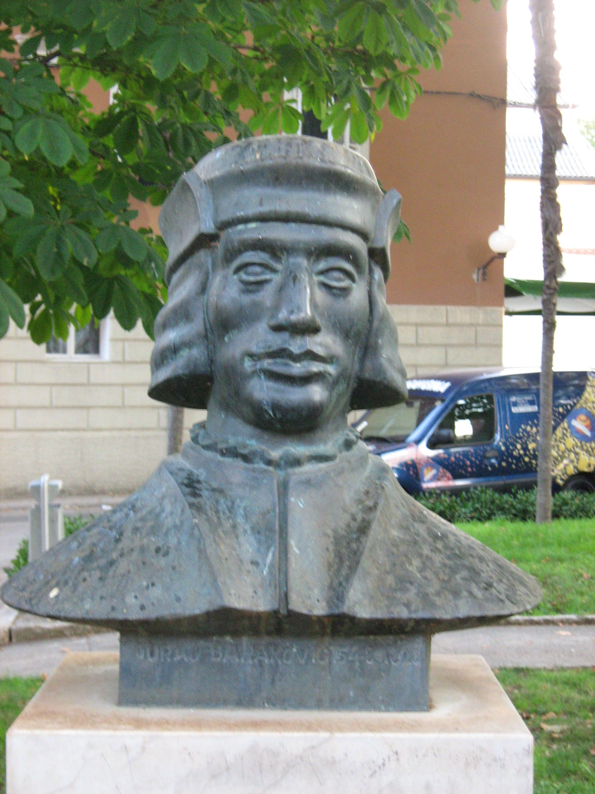 Juraj Baraković